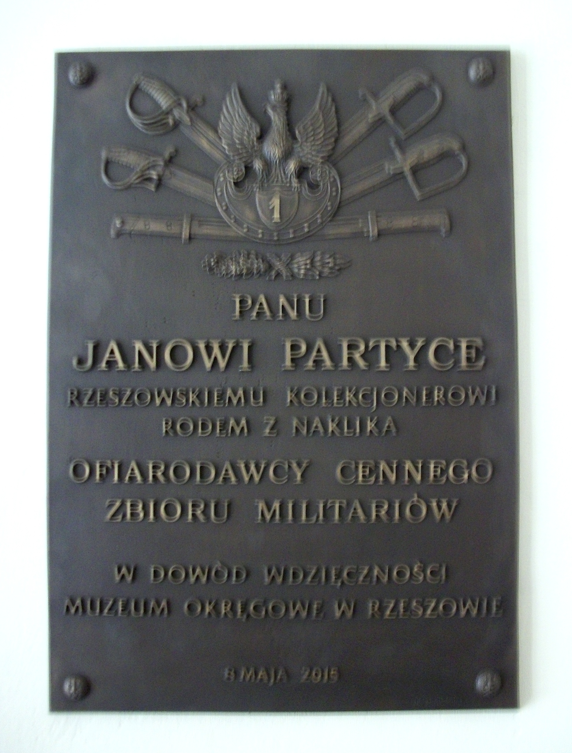 Tablica upamiętniająca Jana Partykę w holu Muzeum Okręgowego w Rzeszowie.